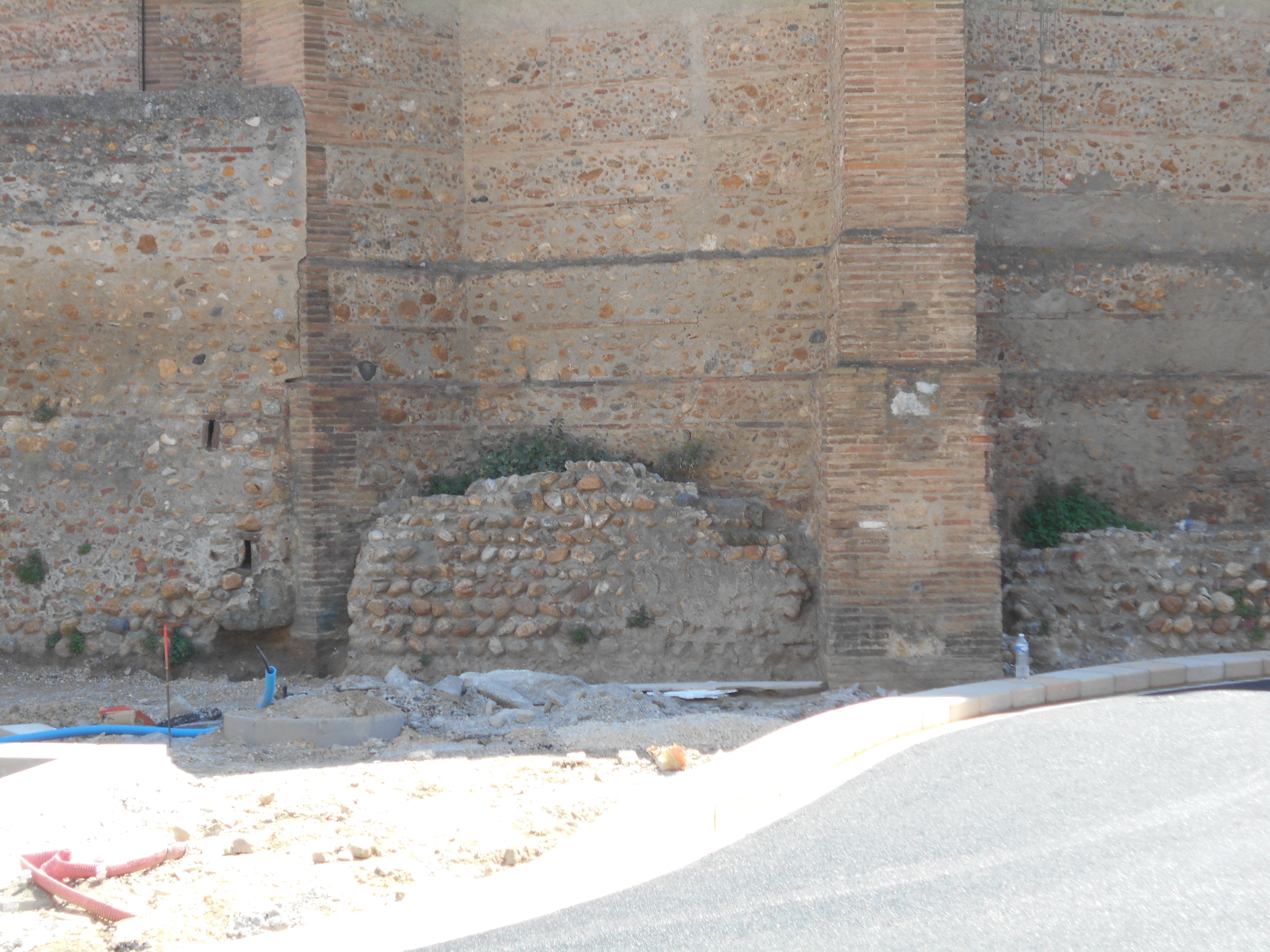 Muralles de la cellera de Vilallonga de la Salanca